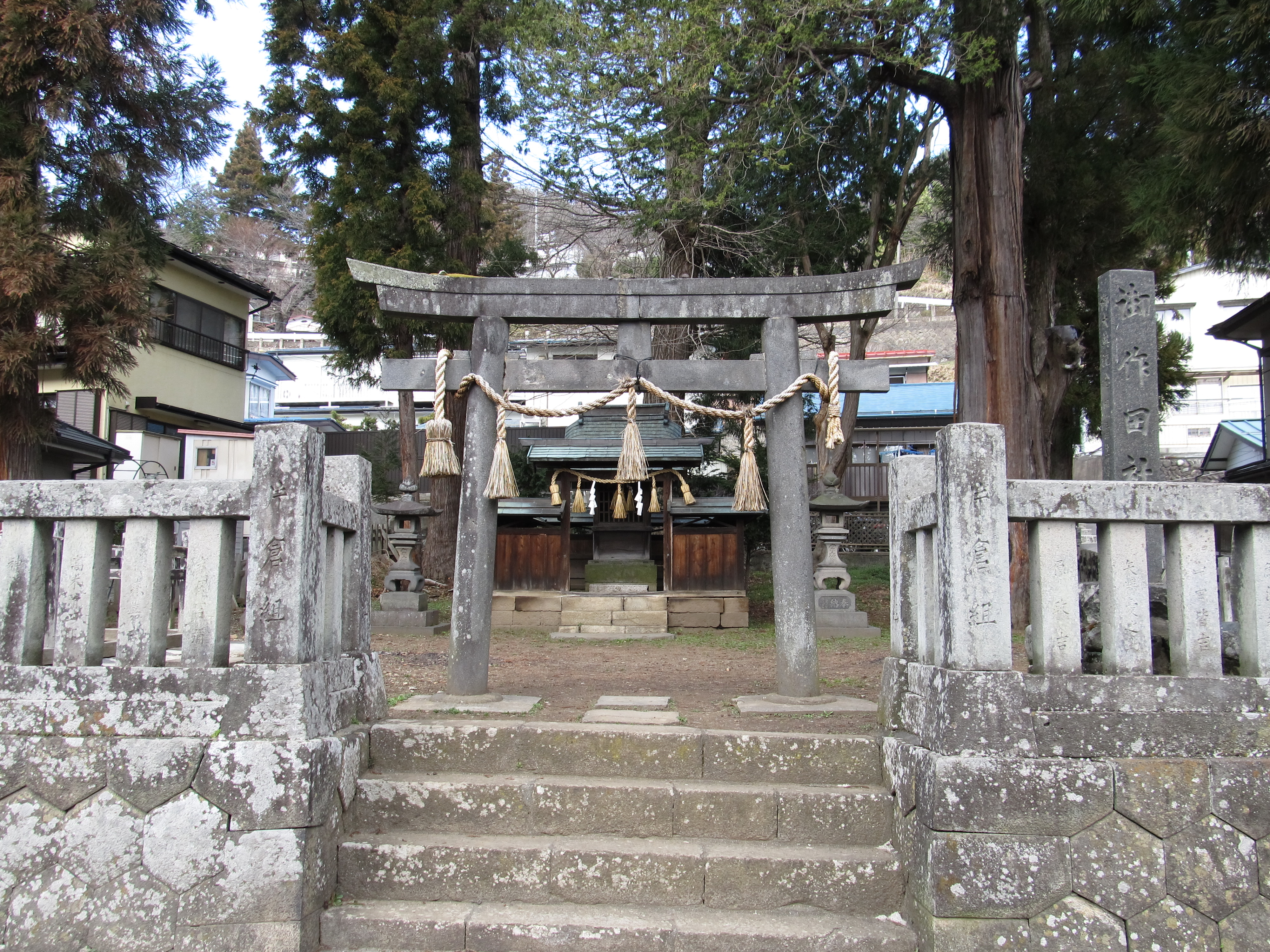 長野県諏訪郡下諏訪町にある御作田神社。6月30日に諏訪大社七不思議の1つ「御作田の早稲」にあたる御田植神事が行われる。